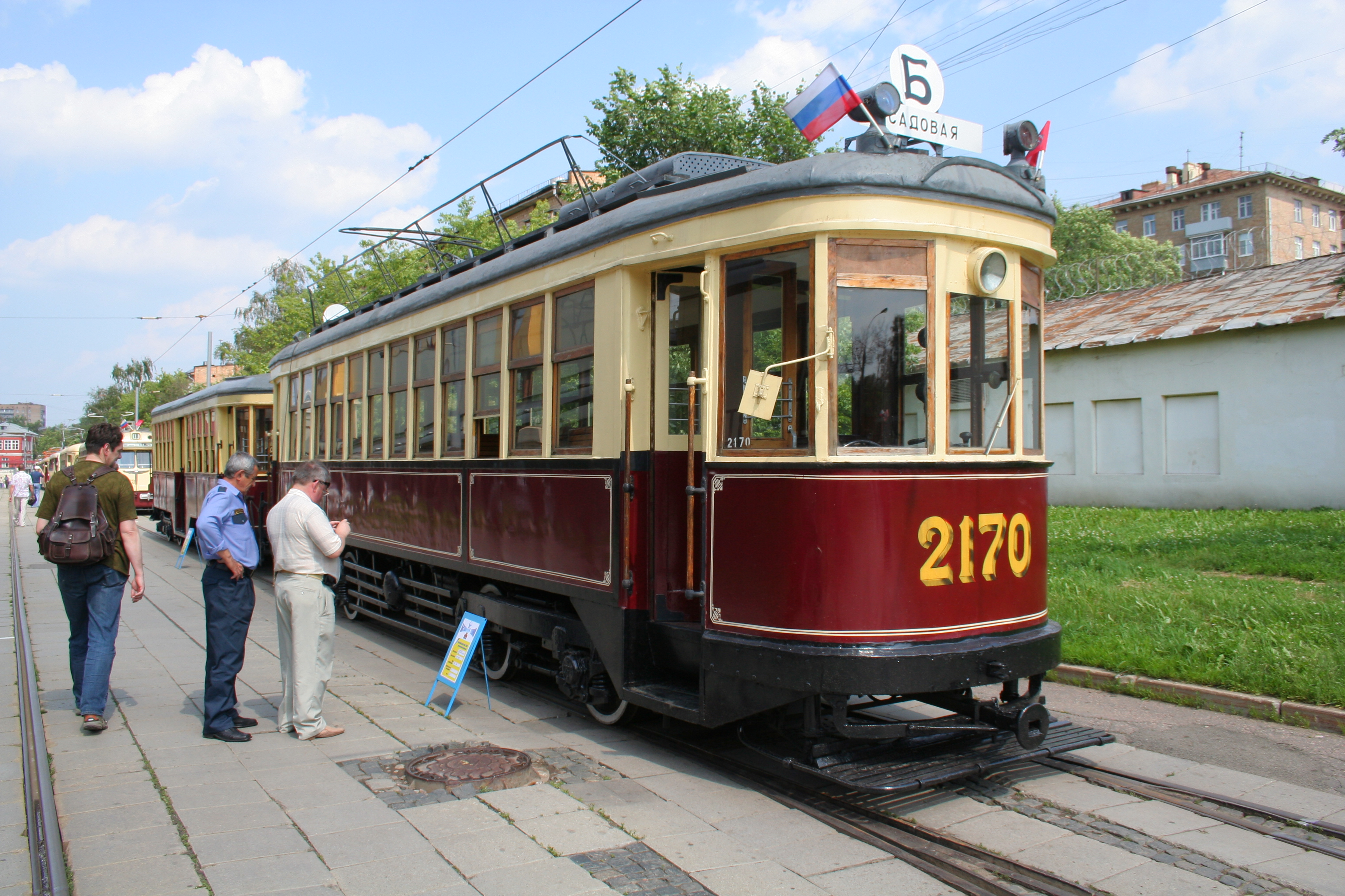 Ретро-трамвай Мосгортранса КМ Коломенского завода на показе около Депо им. Баумана 12 июня 2010 года.